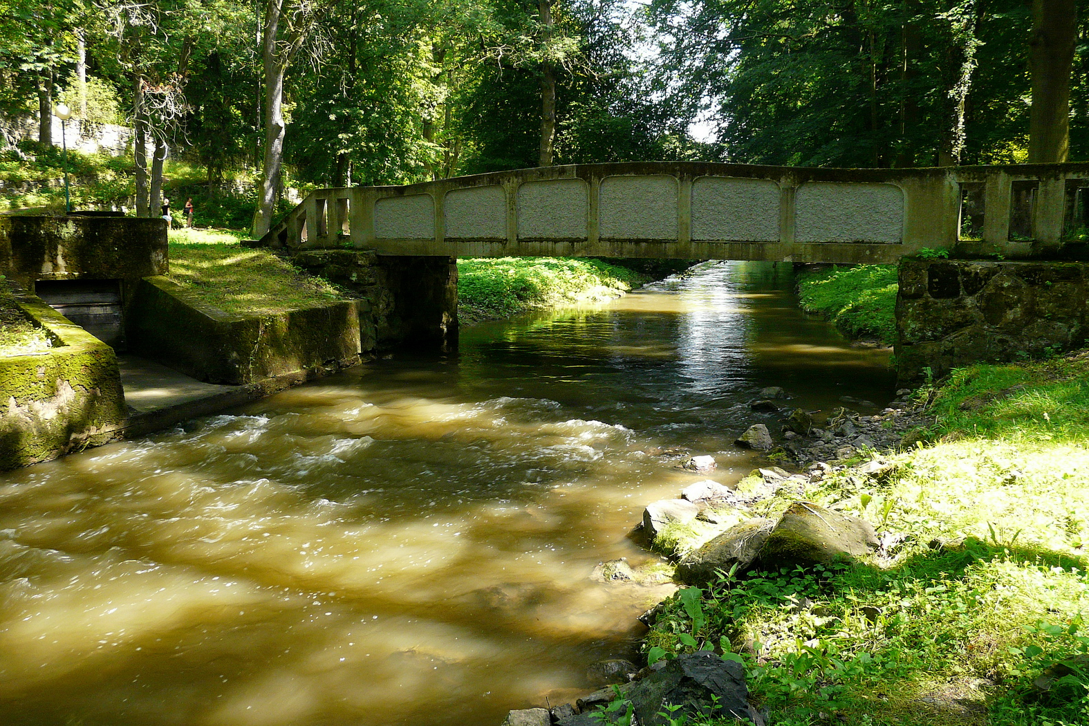 Klenice v lesoparku Štěpánka